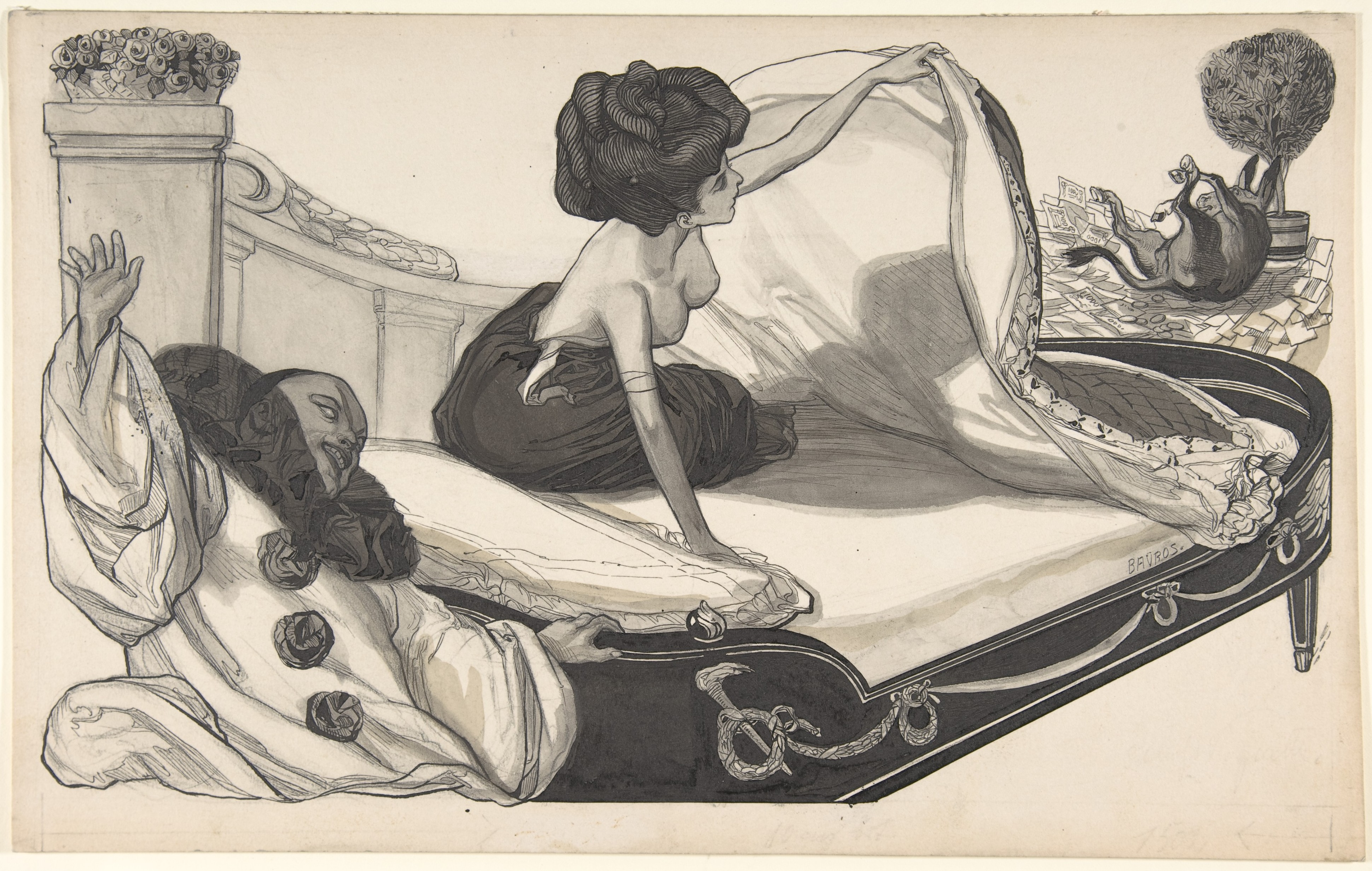 Drawing; Drawings